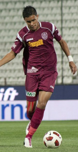 Kolozsvári CFR -Zsilvasarhelyi Pandurok 2-1 (2-0) gól: Ema Kone 18', Alcantara 23'/ Voiculeţ 86'